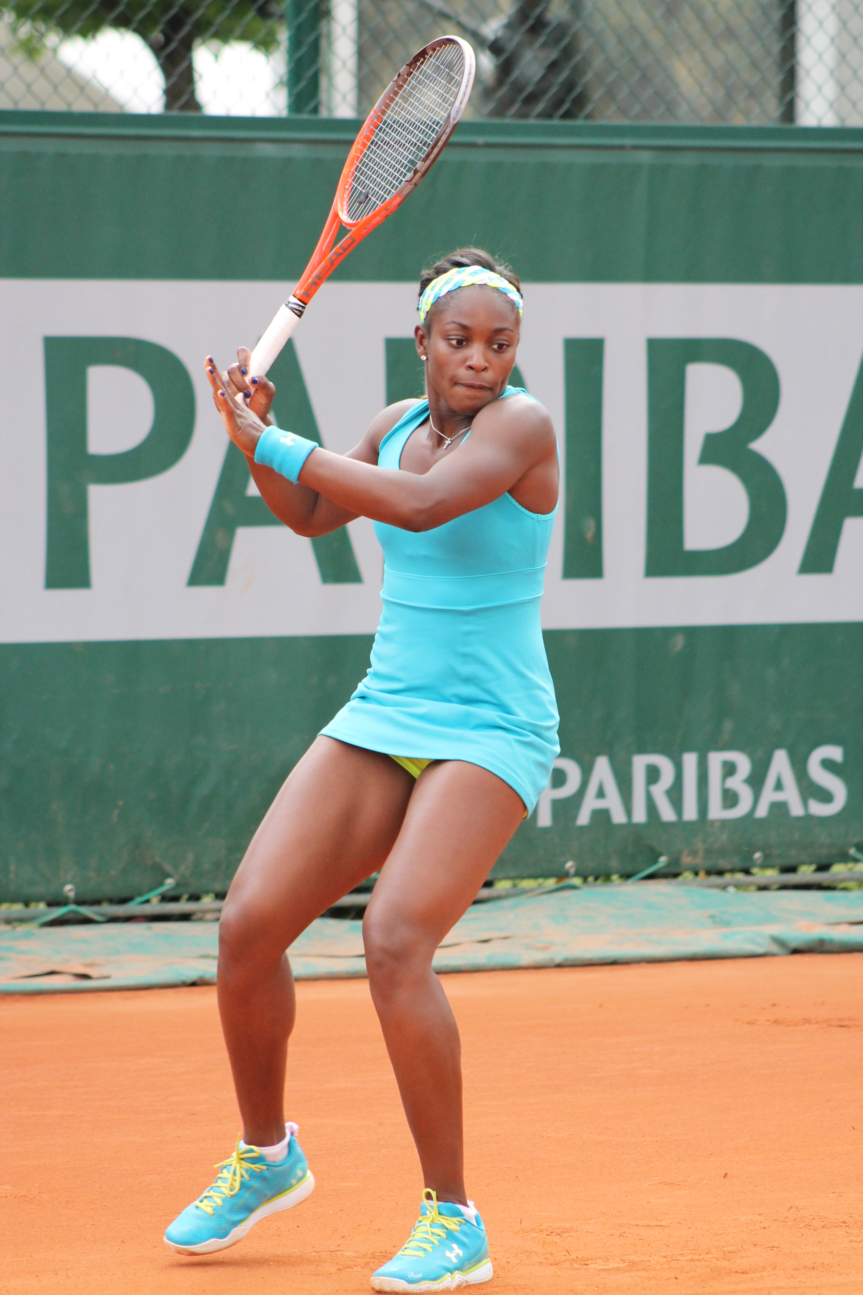 Stephens RG13 (3)